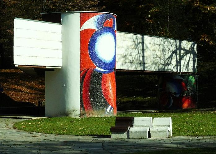 Sliac Słowacja pawilon źródła mineralne